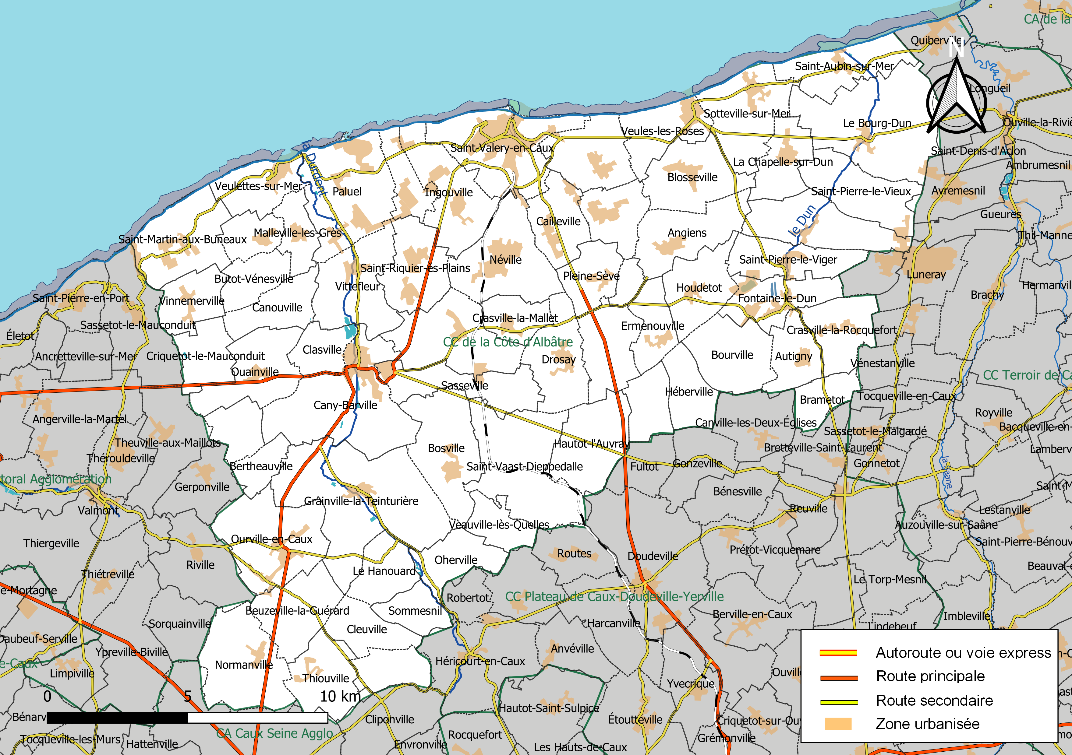 Carte géographique de la Communauté de communes de la Côte d'Albâtre, département de la Seine-Maritime, France. Composition au 1er janvier 2019.